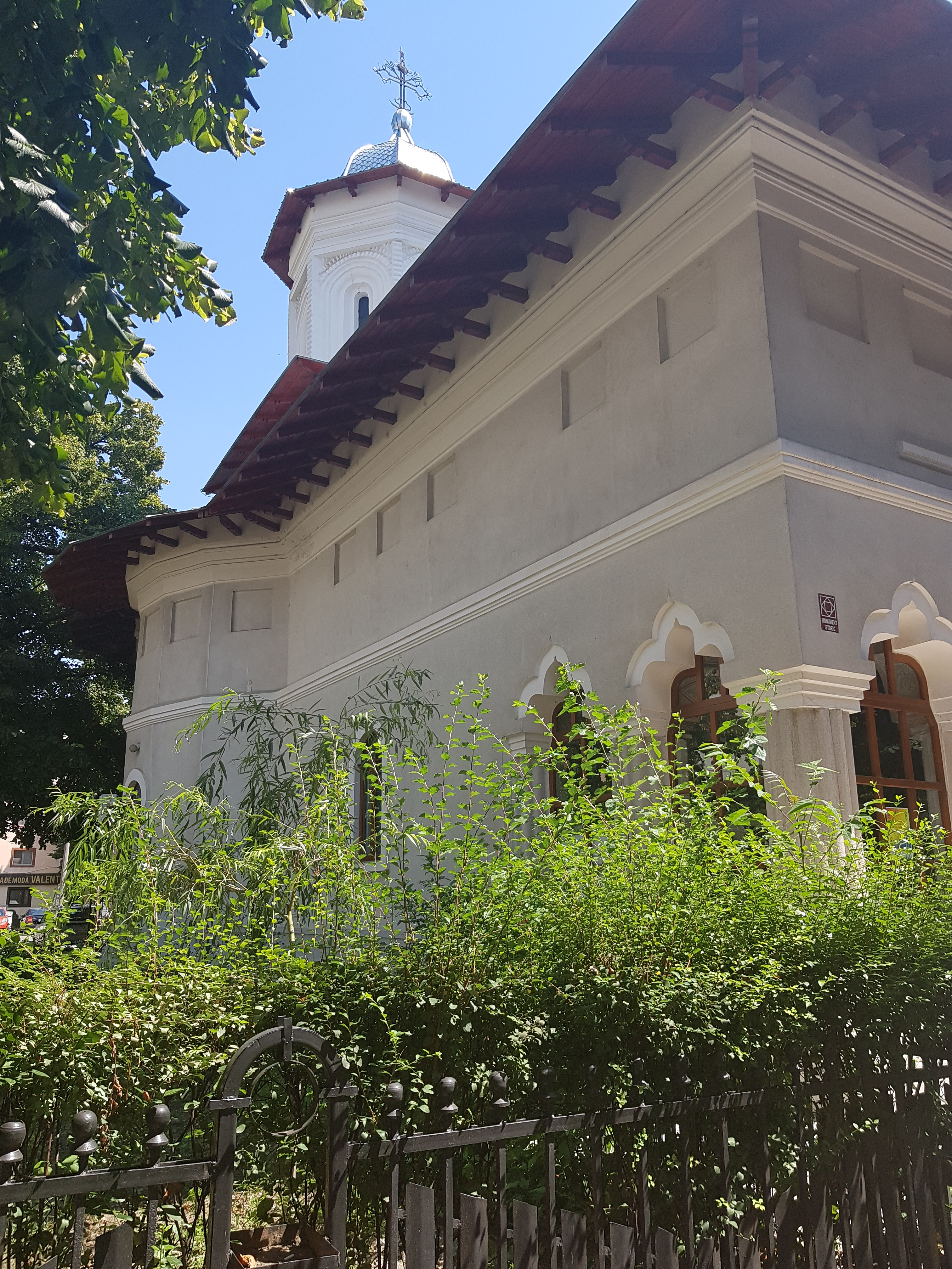 Biserica „Adormirea Maicii Domnului” - Precista